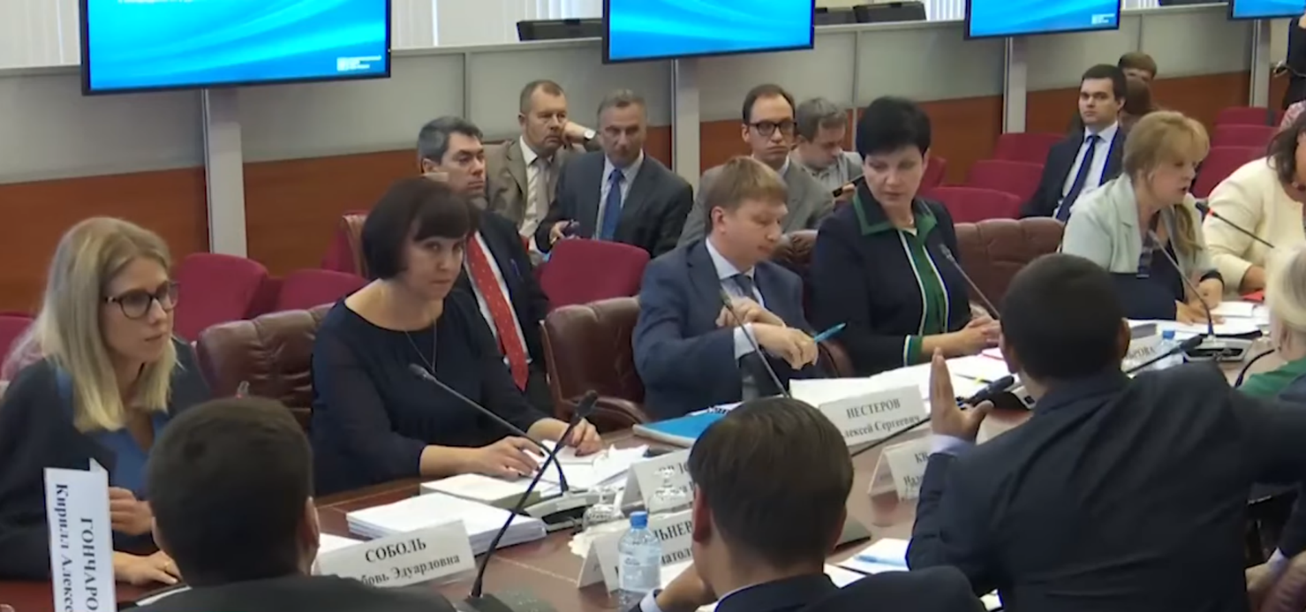 Глава ЦИКа Элла Памфилова 23 июля провела встречу с независимыми кандидатами для обсуждения недопуска независимых кандидатов до выборов в мосгордуму